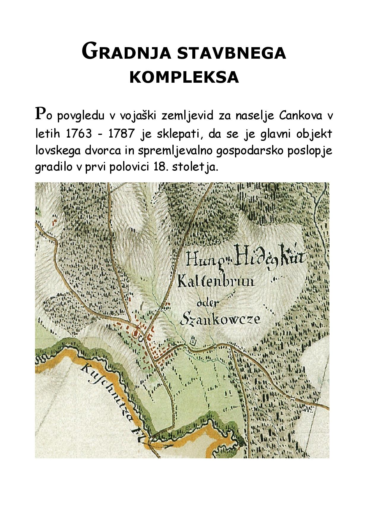 Prikaz lovskega dvorca na zemljevidu iz 18. stoletja.